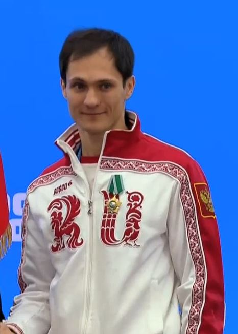 Орденом Дружбы награждён олимпийский чемпион и серебряный призёр Олимпийских игр в шорт-треке Владимир Григорьев.